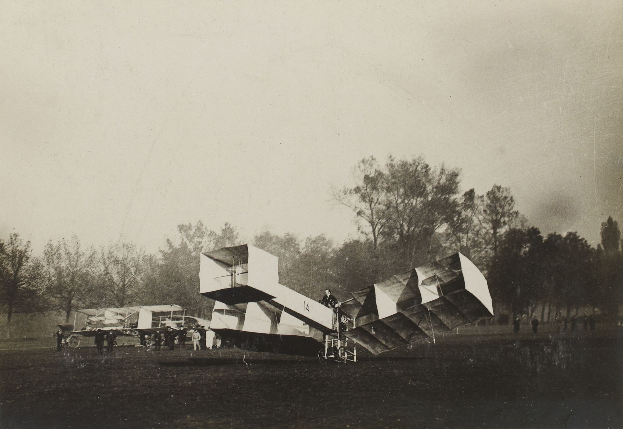 Le 14-bis de Alberto Santos Dumont avec, en arrière-plan, le Blériot IV. [Collection Jules Beau. Photographie sportive] : T. 33. Années 1906 et 1907 / Jules Beau : F. 15. [Les étapes de l\ aviation. Nouveau triomphe de Santos-Dumont. 12 novembre 1906]